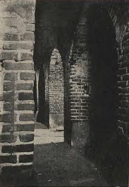 Беларуская (тарашкевіца): Рагачоў (Rahačoŭ). Замак